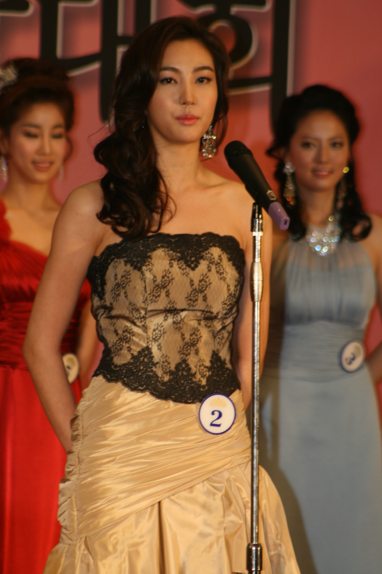 2009 미스코리아 서울 미 박예주 드레스 심사